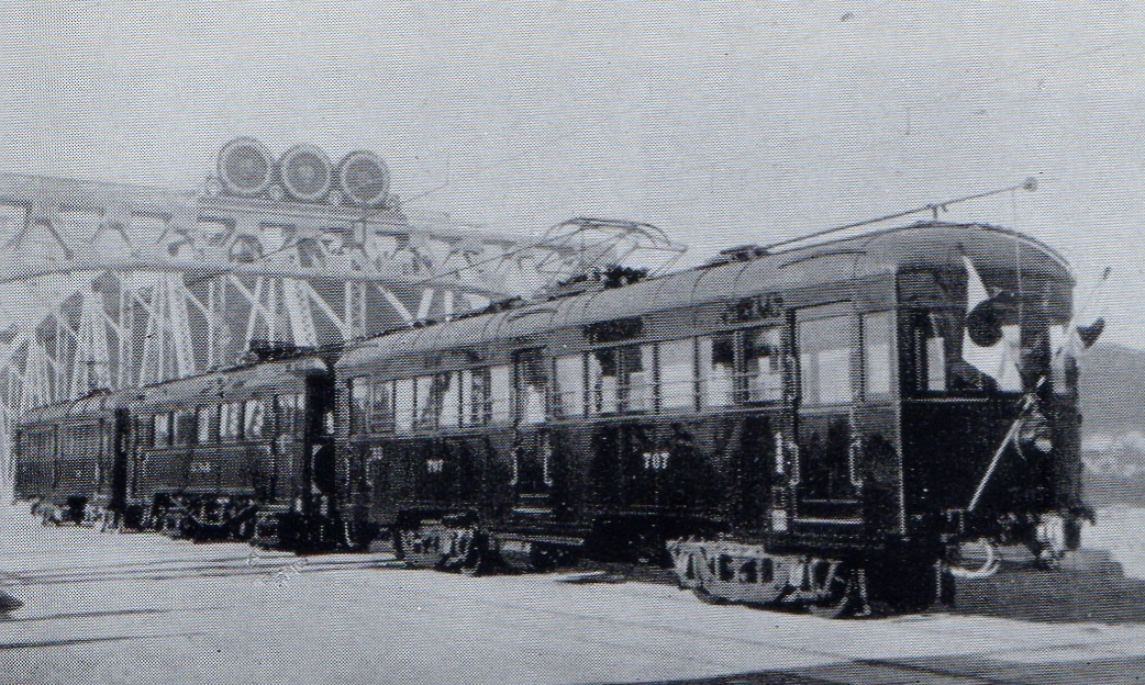 お召し列車運用に就くデセホ700形とトク3号